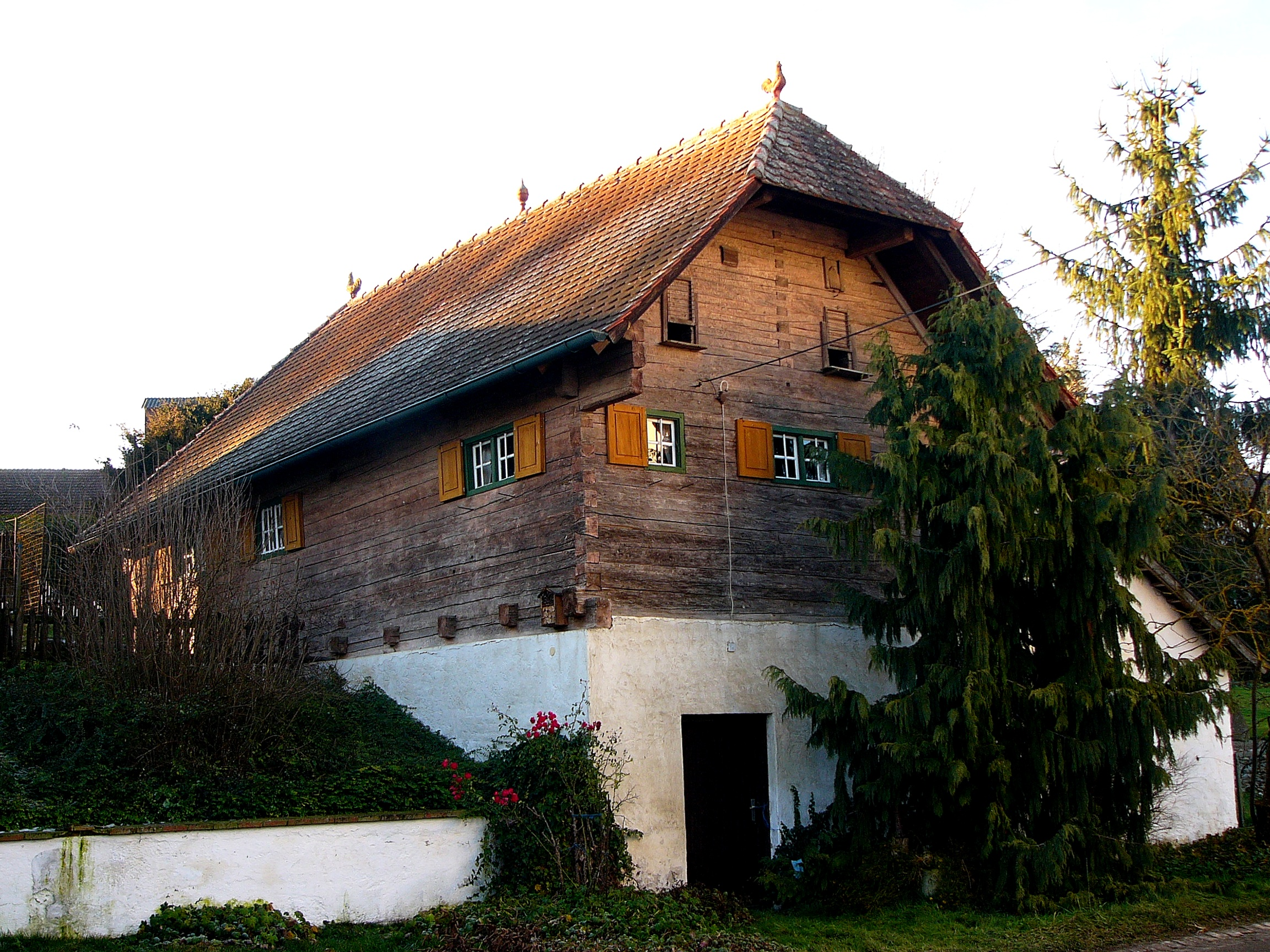 Ehemaliges Austragshaus; zum gegenüberliegenden Hof Nr. 10, eingeschossiger Blockbau mit Schopfwalmdach und hohem, sockelartigen Untergeschoss, 18. Jahrhundert, Eiskelleranbau nach 1812; Back- und Waschhaus, massiver Satteldachbau, mit angebauter Kegelbahn, langgestreckter Pultdachbau, 19. Jahrhundert.This is a photograph of an architectural monument.